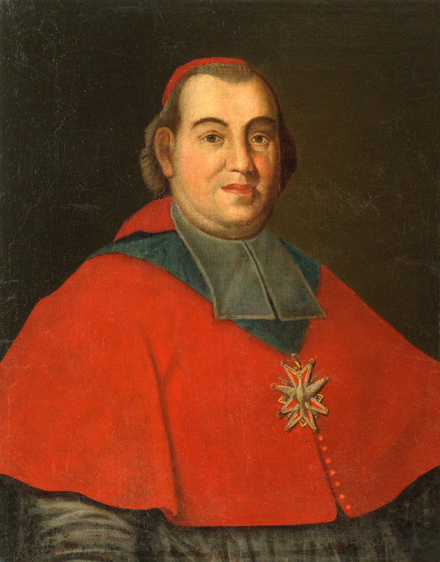 Кардынал Ян Аляксандр Ліпскі (1690–1745). Сярэдзіна XVIII ст. З Нясвіжскага збору Радзівілаў у НММ РБ